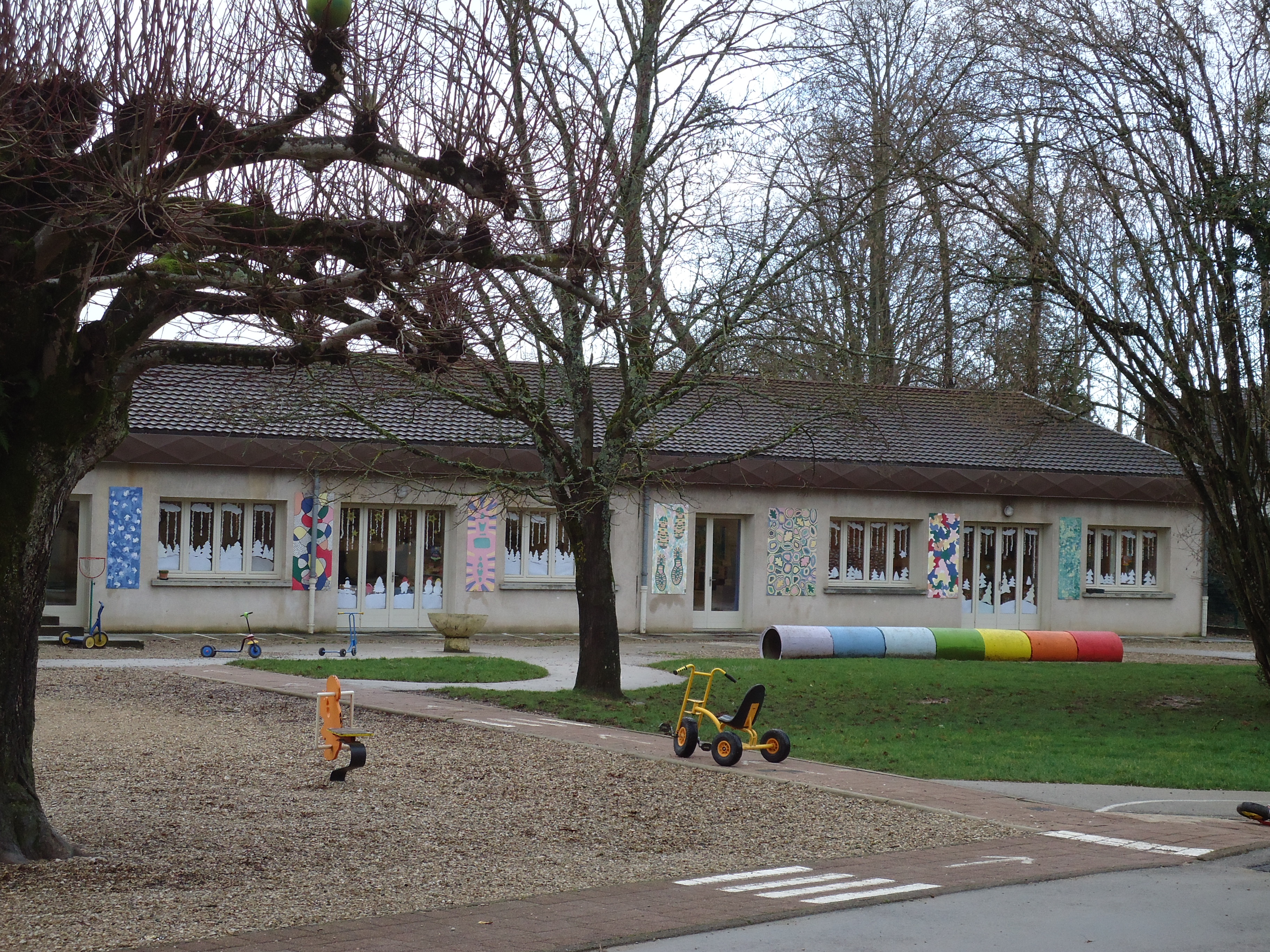 Ecole maternelle de Foucherans (39)